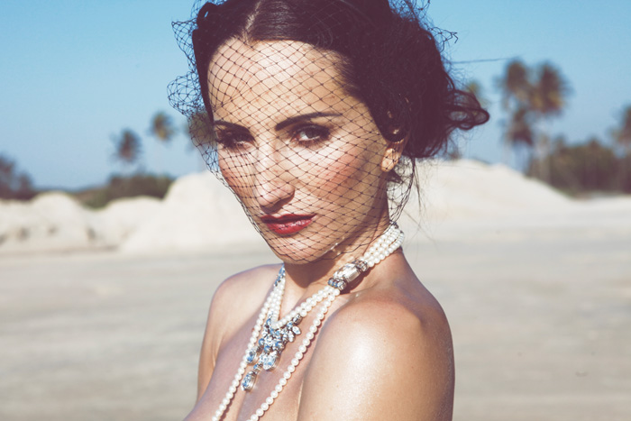 Justyna Steczkowska polska piosenkarka